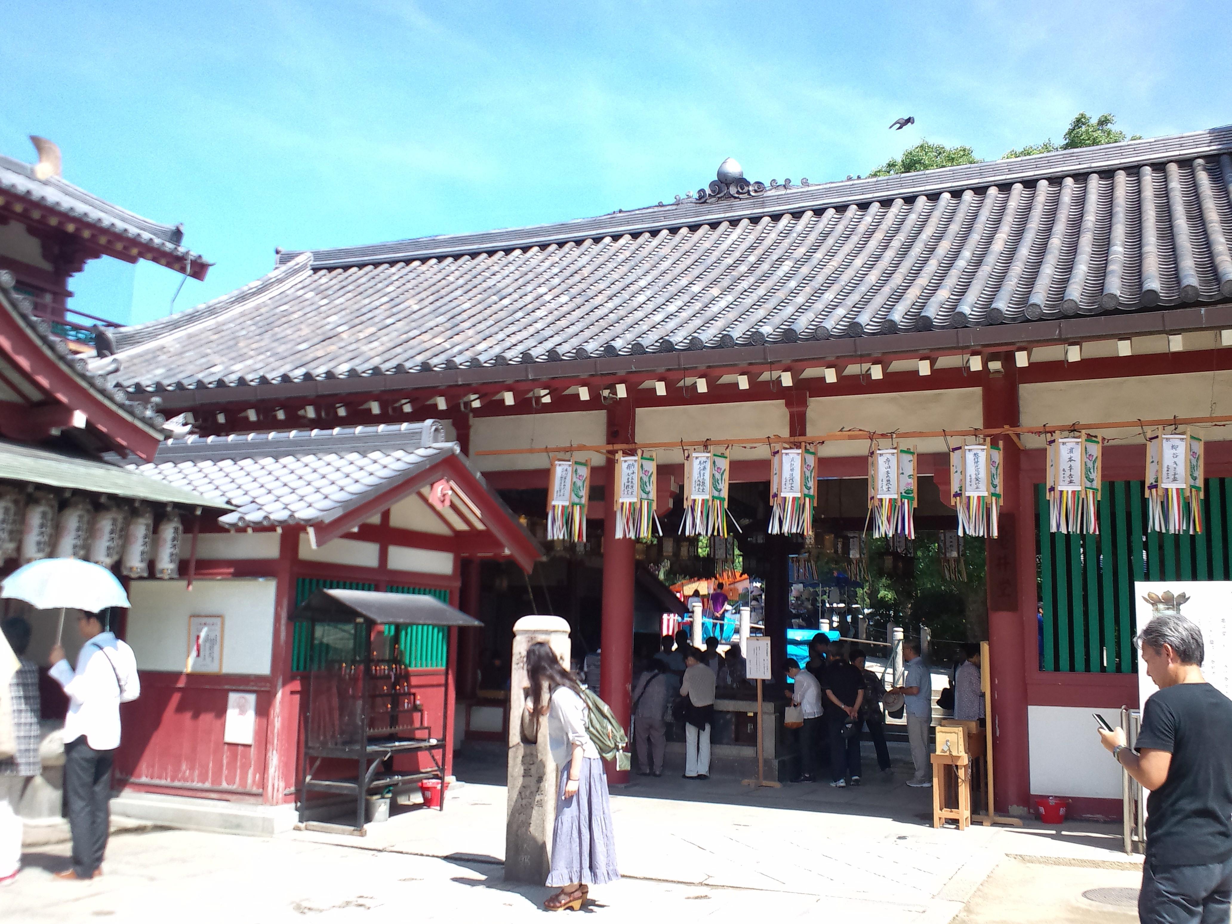 四天王寺 亀井堂